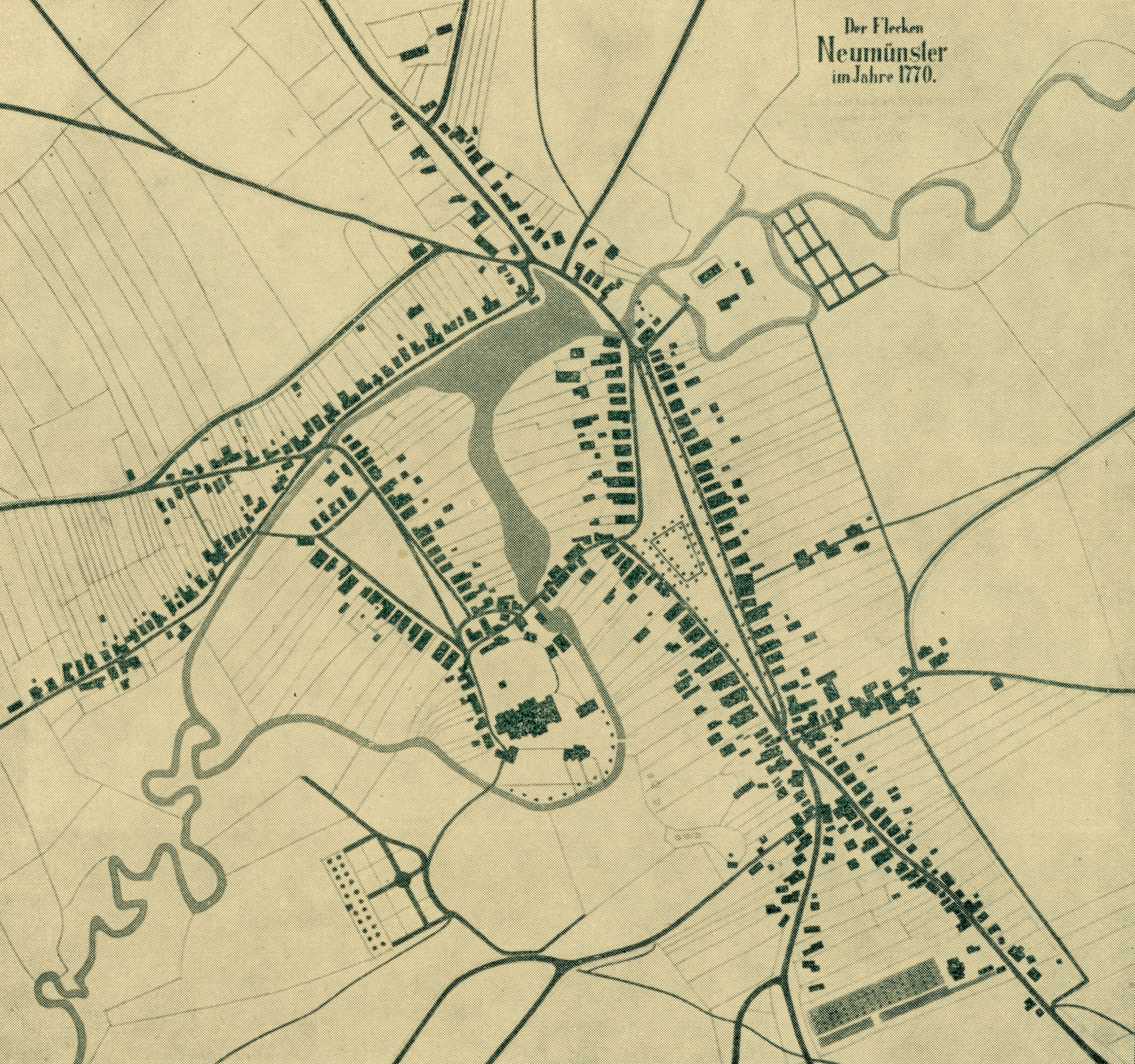 Fritz Tonners Auszug aus der 1770 von Kapitän Rasch gezeichneten Karte